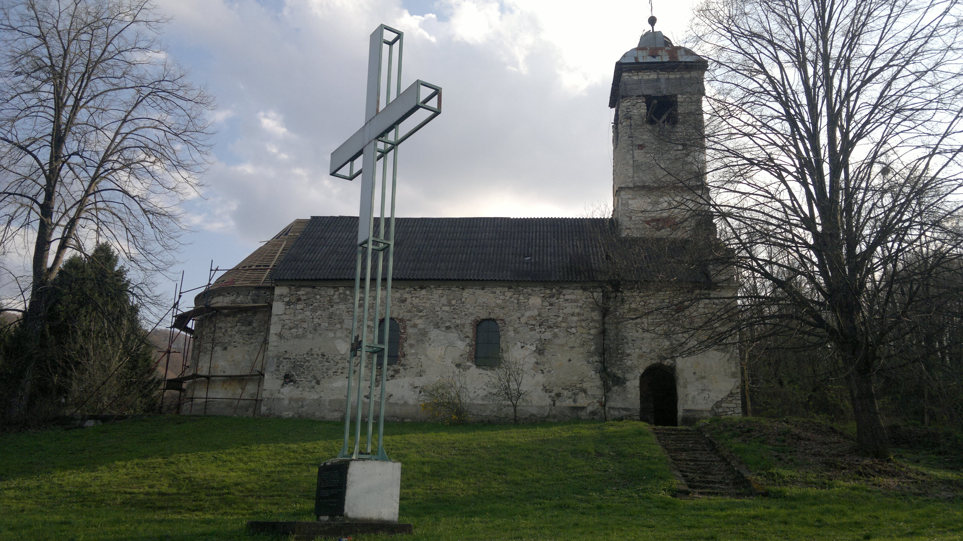 crkva Svetog velikomučenika Georgija (1719.)